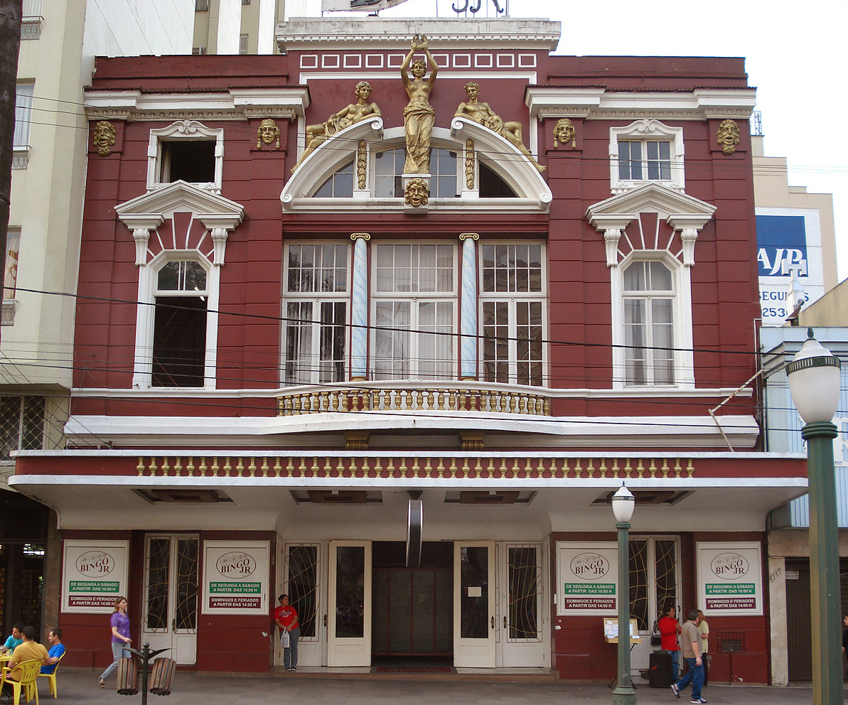 Antigo Cine Central, uma das sedes do Recreio da Juventude, Caxias do Sul, Brasil.